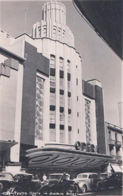 Fotografía de alrededor de los años 1930 del Teatro Ópera de Buenos Aires, cuyo edificio actual fue terminado en 1931. Fue proyectado por el arquitecto Alberto Bourdon, basándose en cine "Le Grand Rex" de París.